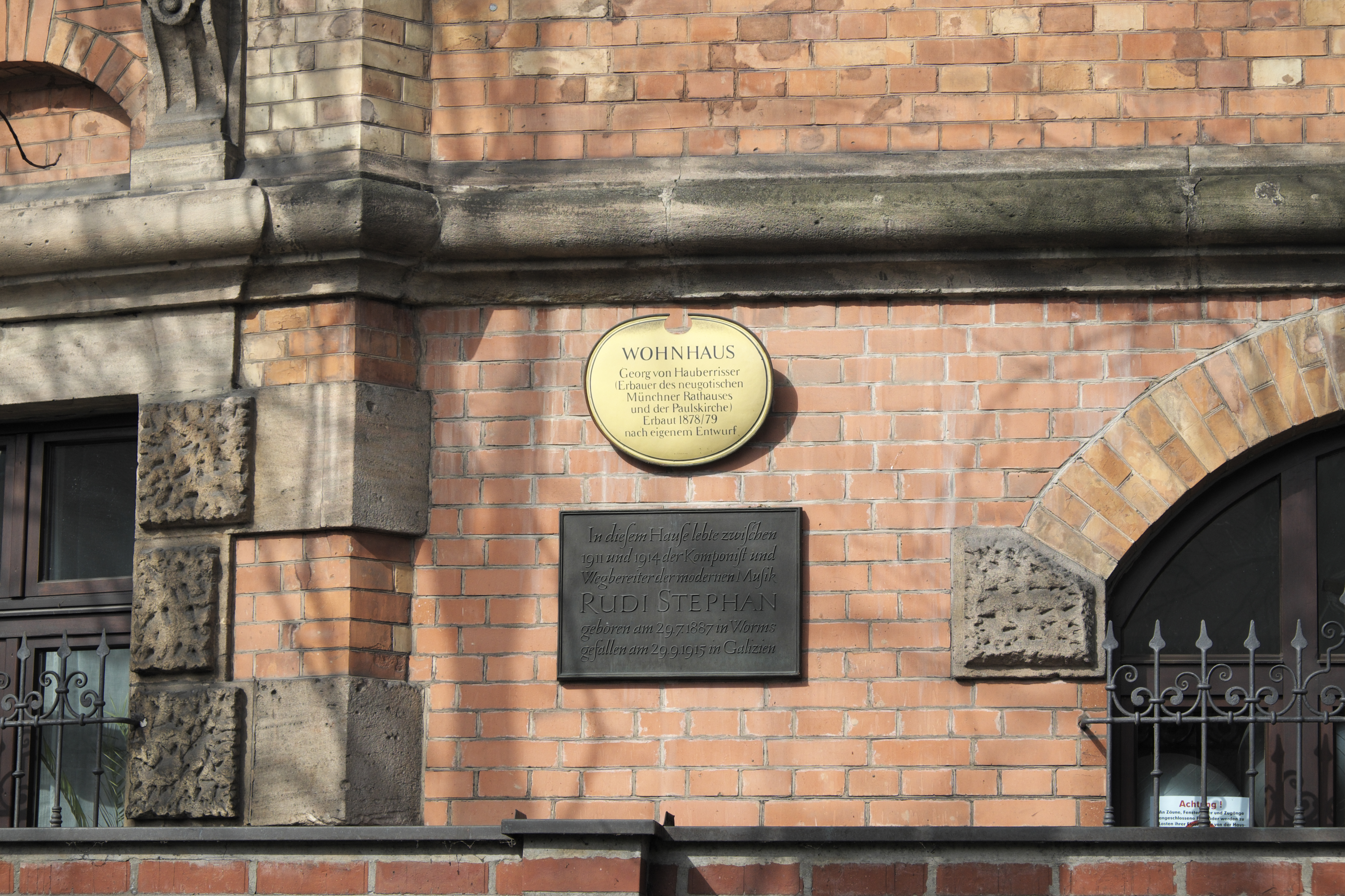 Mietshaus in der Schwanthalerstraße 106 im Stadtbezirk Schwanthalerhöhe in München (Bayern/Deutschland), 1878/79 von Georg von Hauberrisser erbaut, Gedenktafel